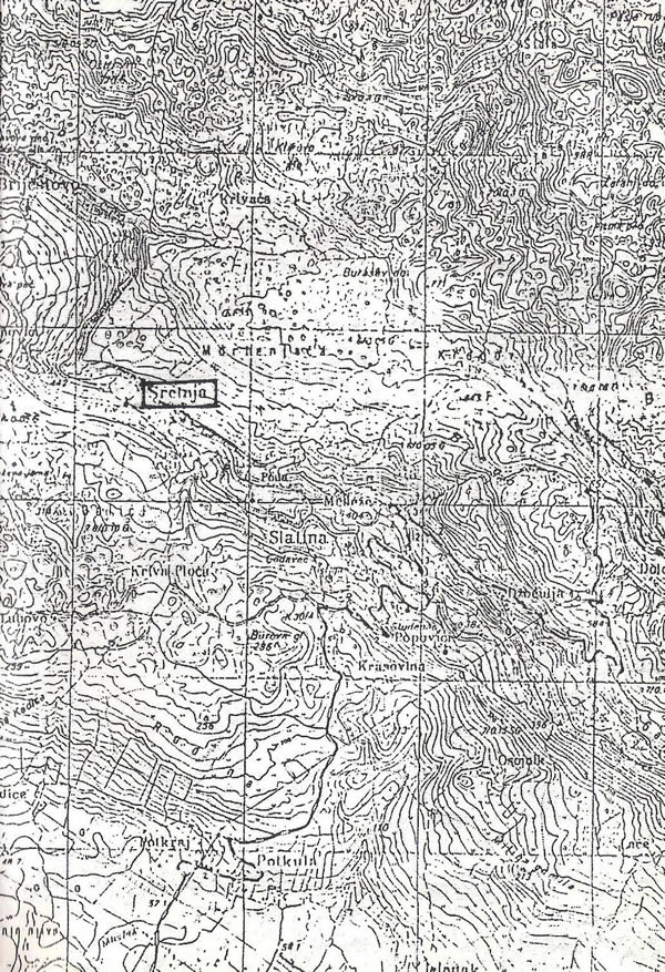 Карта Сретња, Бјелопавлићи